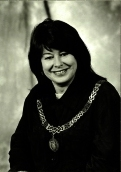 L. van Maaren-van Baalen, burgemeester Weert in de periode 1991-1999